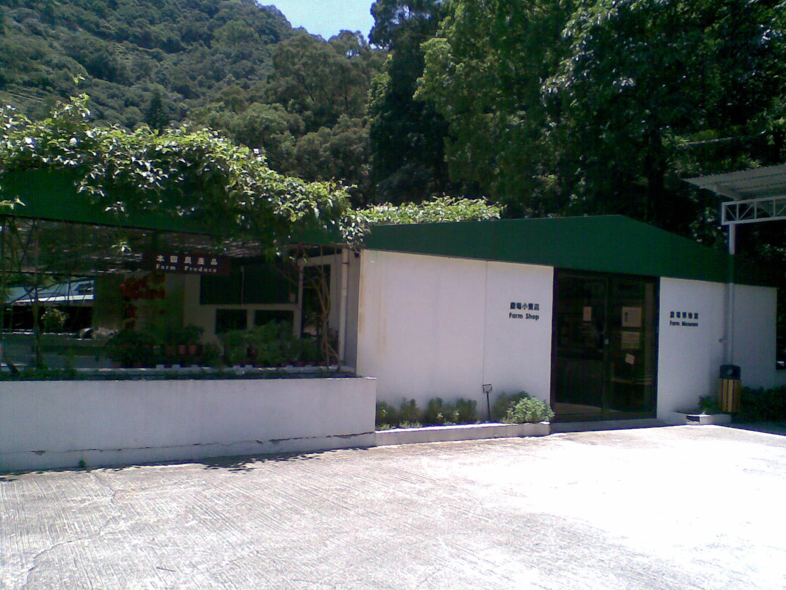 中文（香港）: 嘉道理農場博物館及小賣店